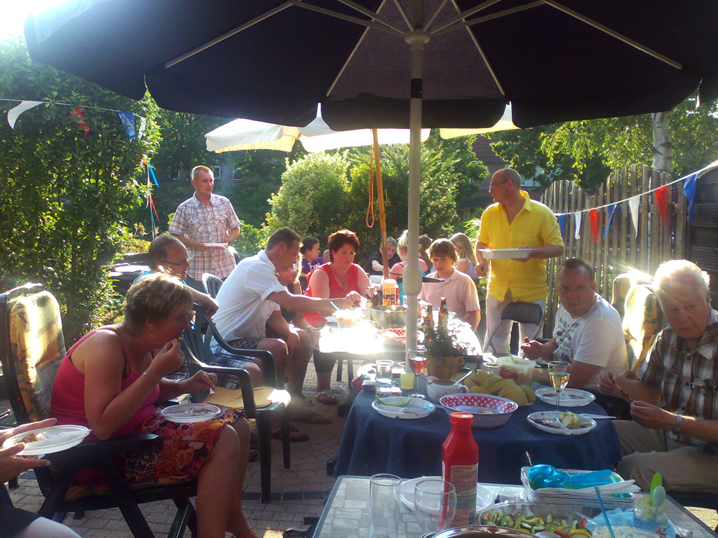 Typische Nederlandse familiebarbecue. (Typical Dutch family barbecue)